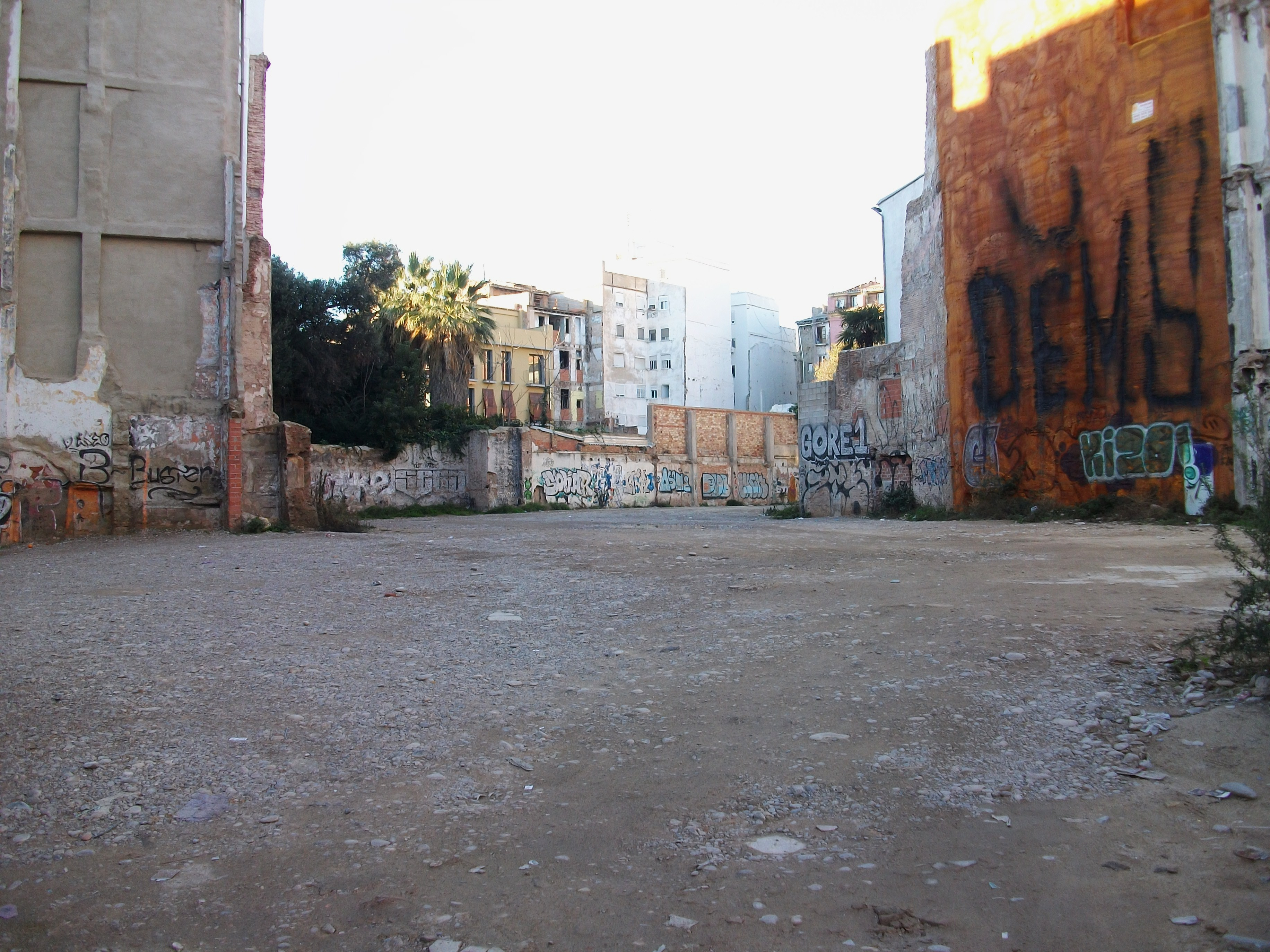 Solar on estava el teatre Princesa, València.